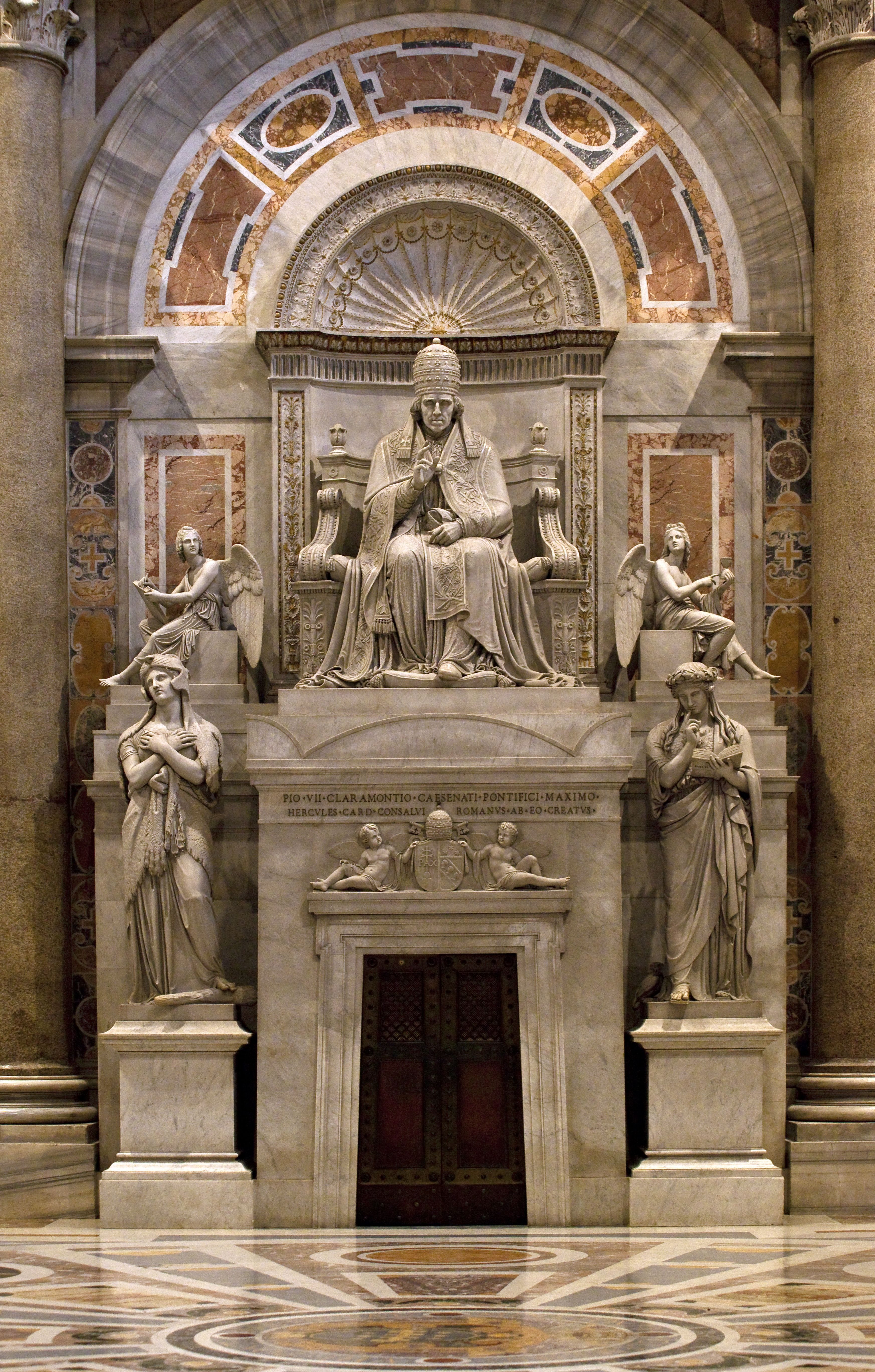 Grabmal Pius VII., geboren als Graf Luigi Barnaba Niccolò Maria Chiaramonti (* 14. August 1742 Cesena, Kirchenstaat; † 20. August 1823 Rom), Papst von 1800 bis zu seinem Tod 1823 von Bertel Thorwaldsen in St. Peter (Rom)